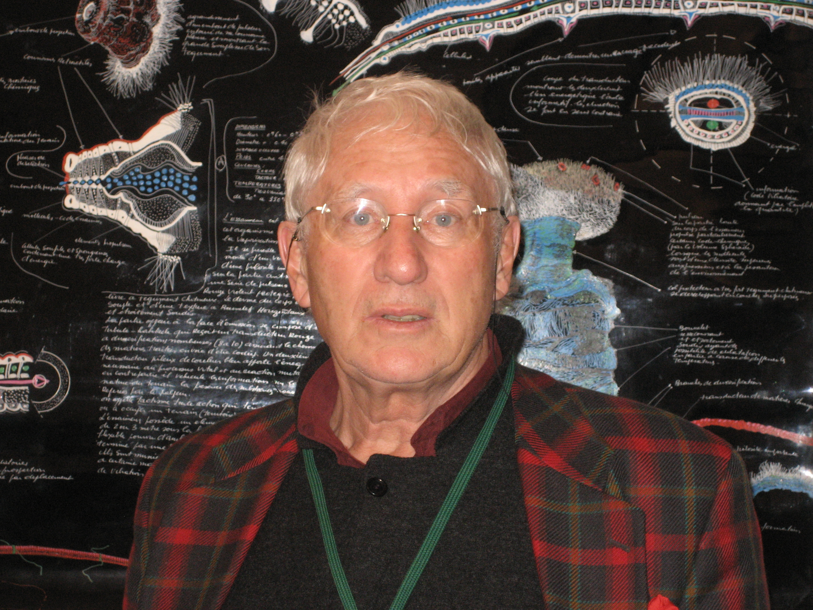 Porträt des deutschen Künstlers und Schriftstellers Jürgen Claus (2007)